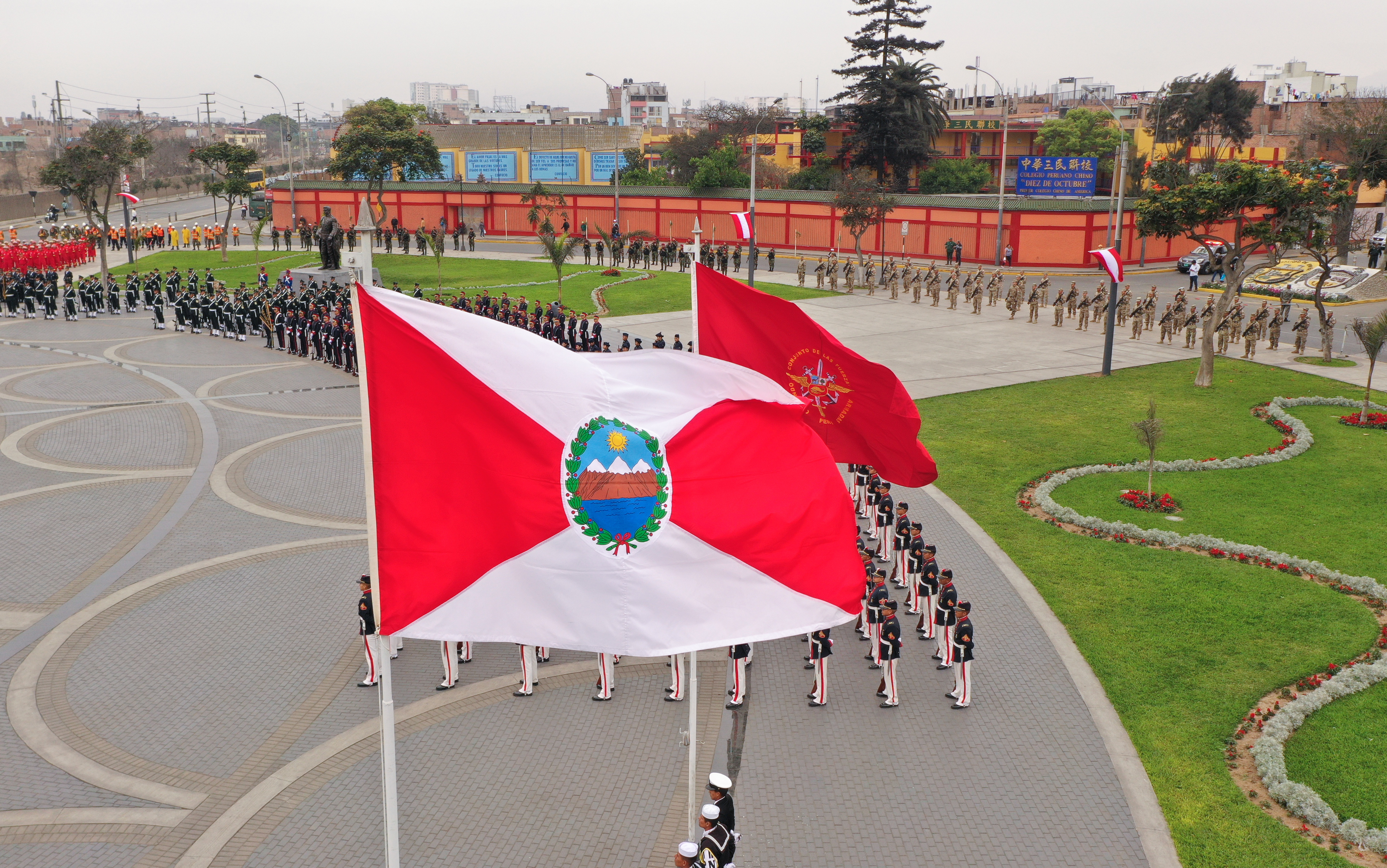 MINISTRO DE DEFENSA PRESIDIÓ CEREMONIA POR EL 199 ANIVERSARIO DE CREACIÓN DE LA PRIMERA BANDERA DEL PERÚ